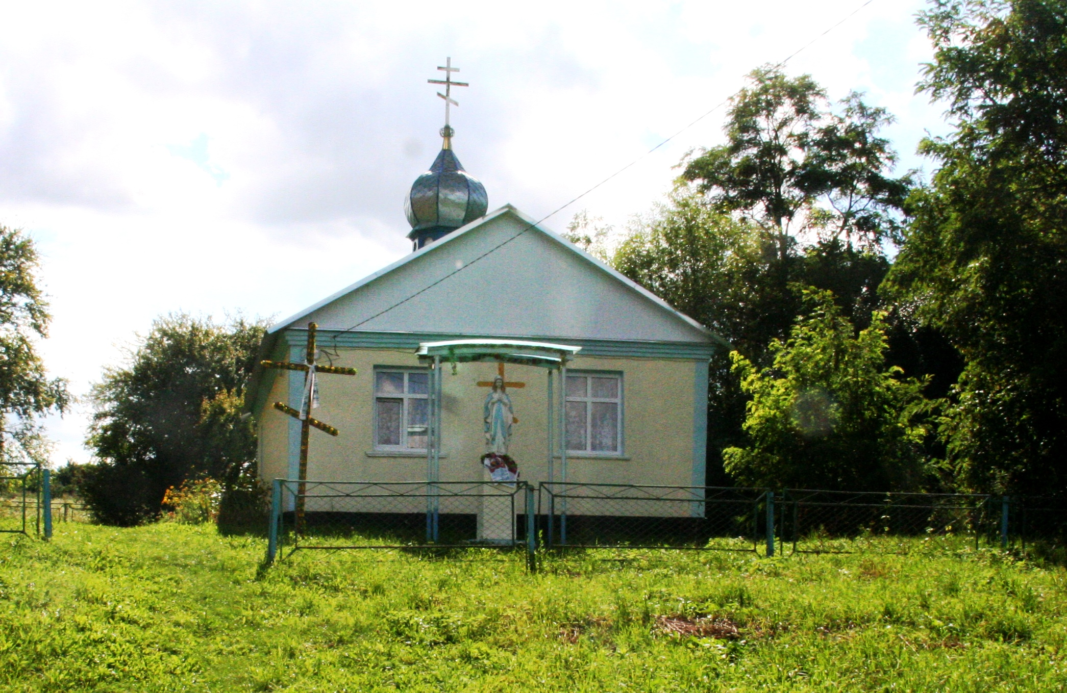 Церква на честь Різдва Пресвятої Богородиці УПЦ КП